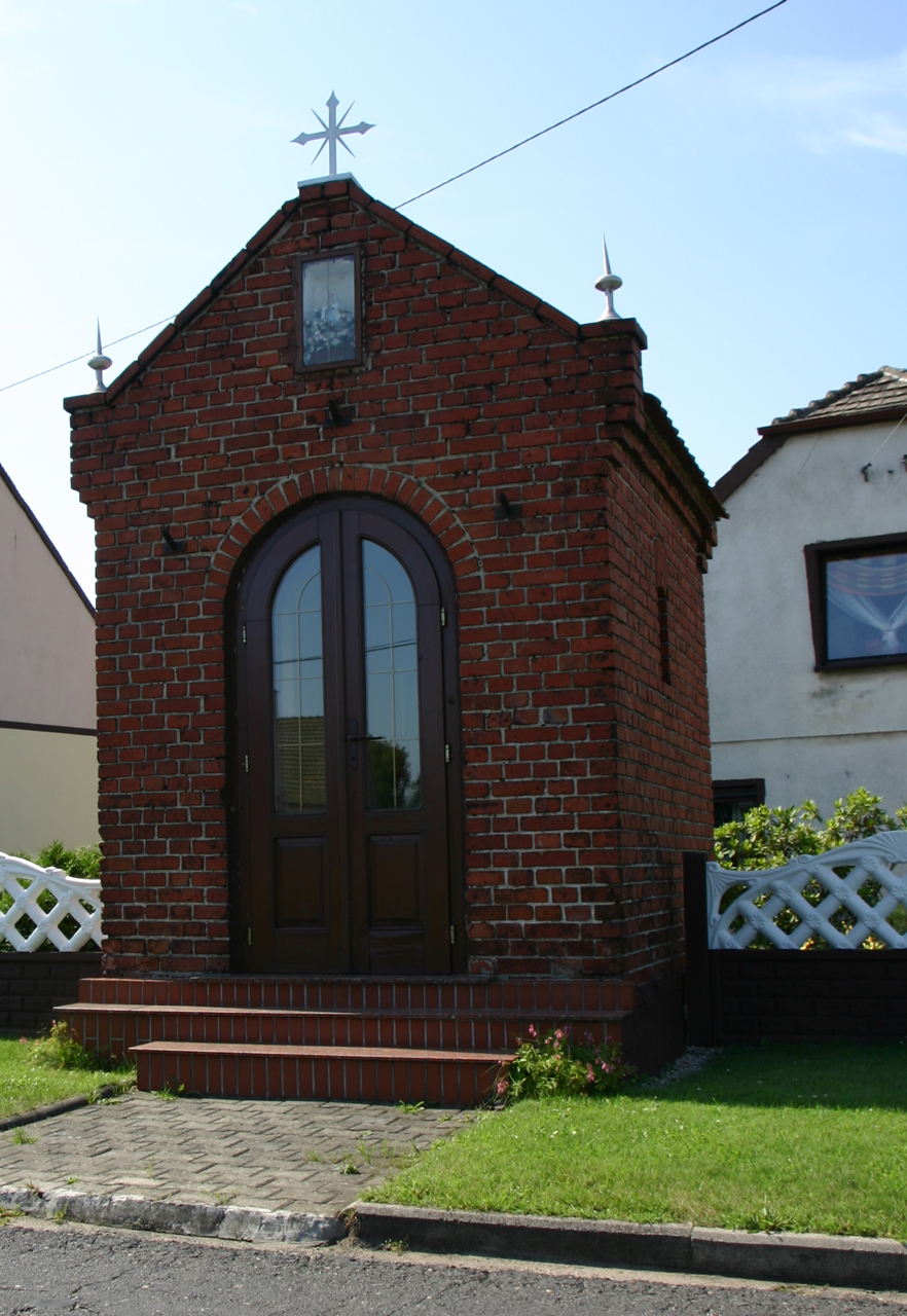 Ścigów (dodatkowa nazwa w j. niem. Schiegau) – wieś w Polsce położona w województwie opolskim, w powiecie krapkowickim, w gminie Strzeleczki.